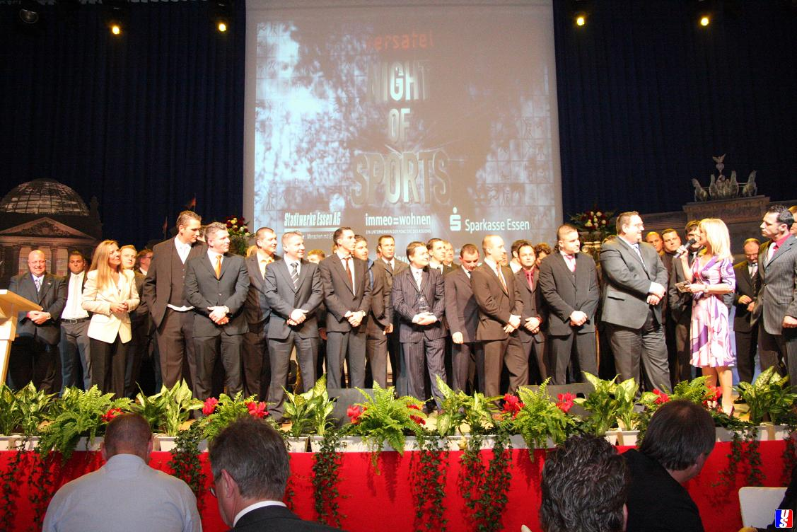 Versatel Night of Sports 2008 - Verleihung Mannschaft des Jahres - made by